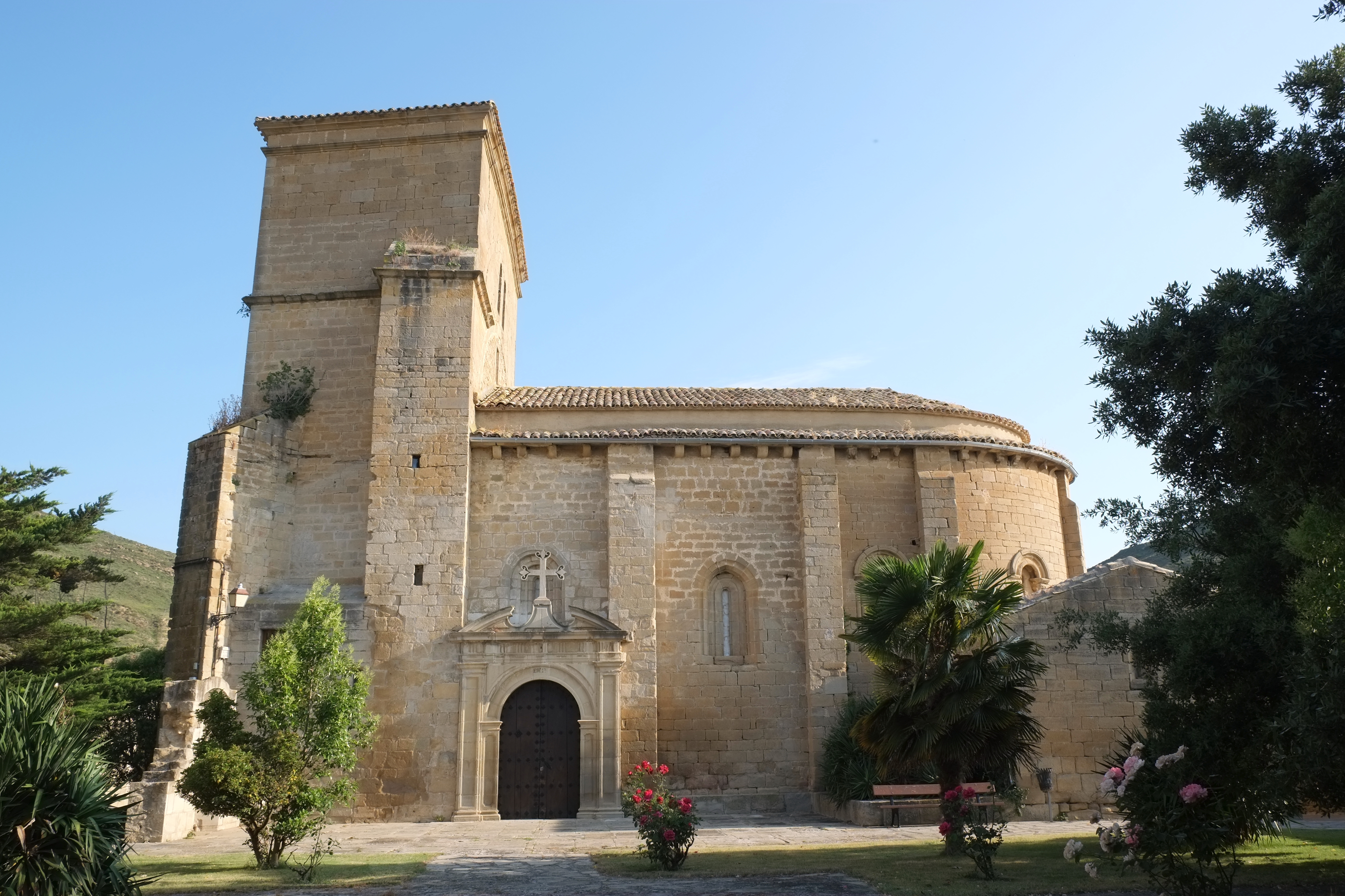 Kirche in Lerga in Navarra (Spanien)